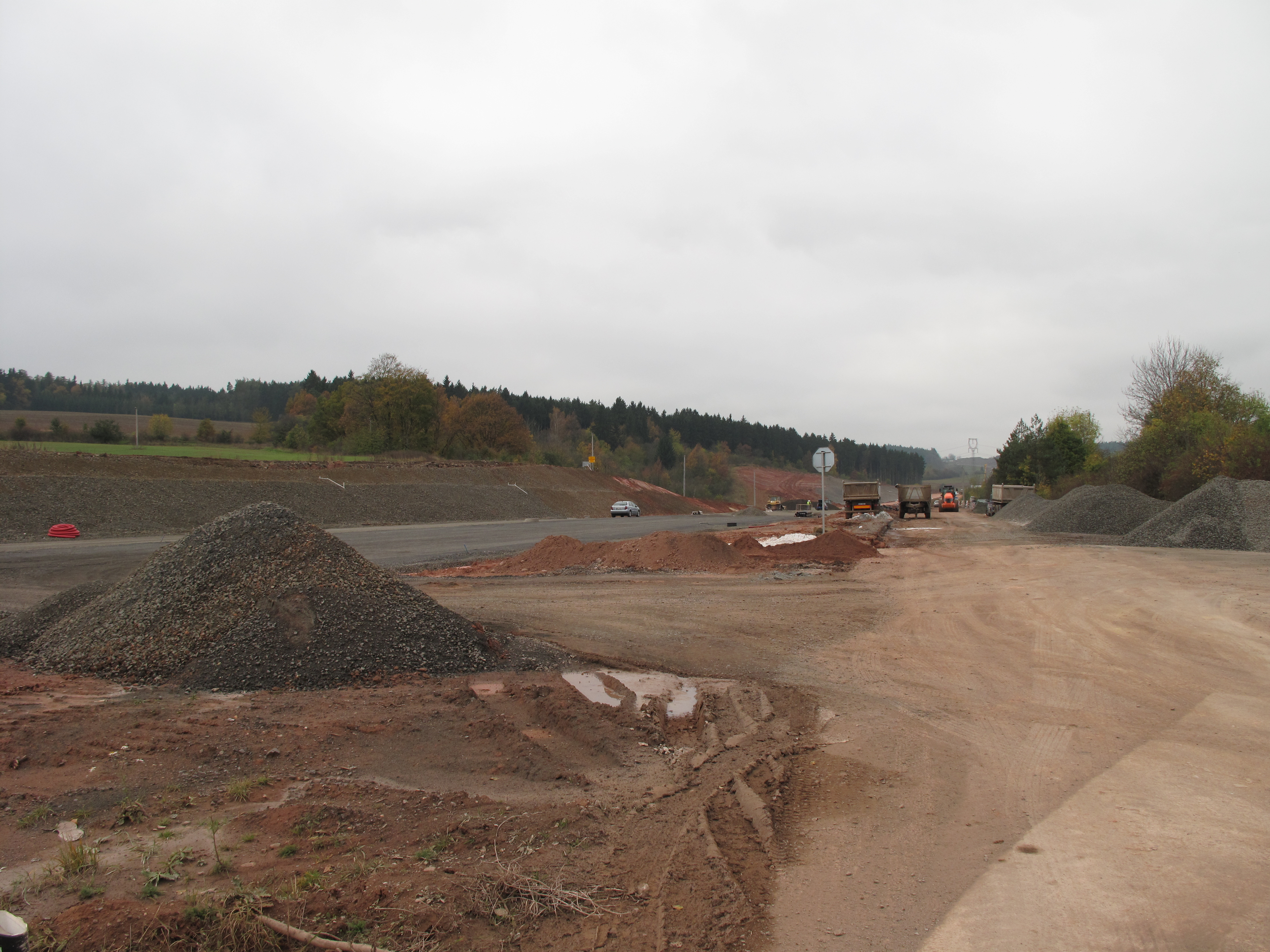 Stavba dálnice D6 u Libkovic. Okres Louny, Česká republika.